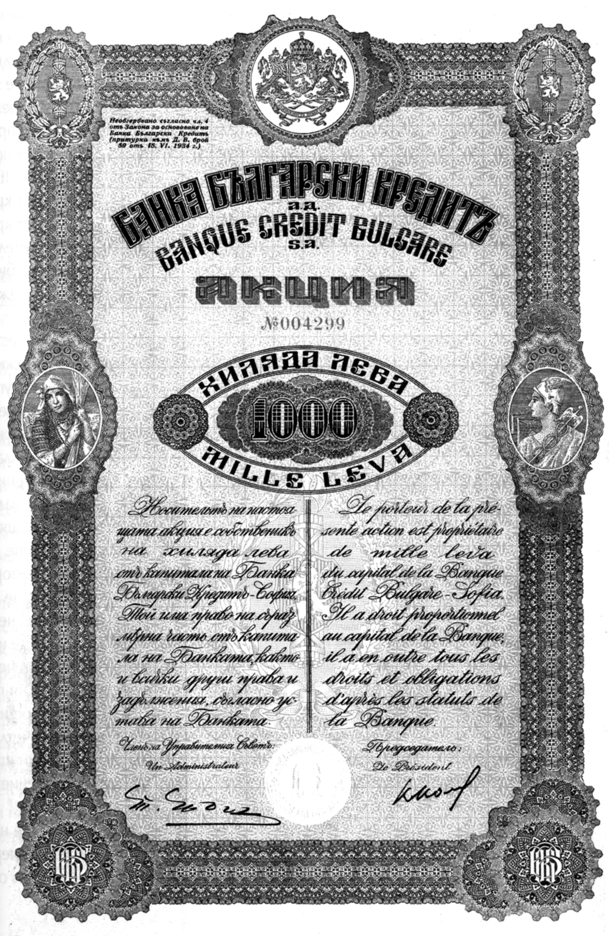 Акция на Банка Български кредит